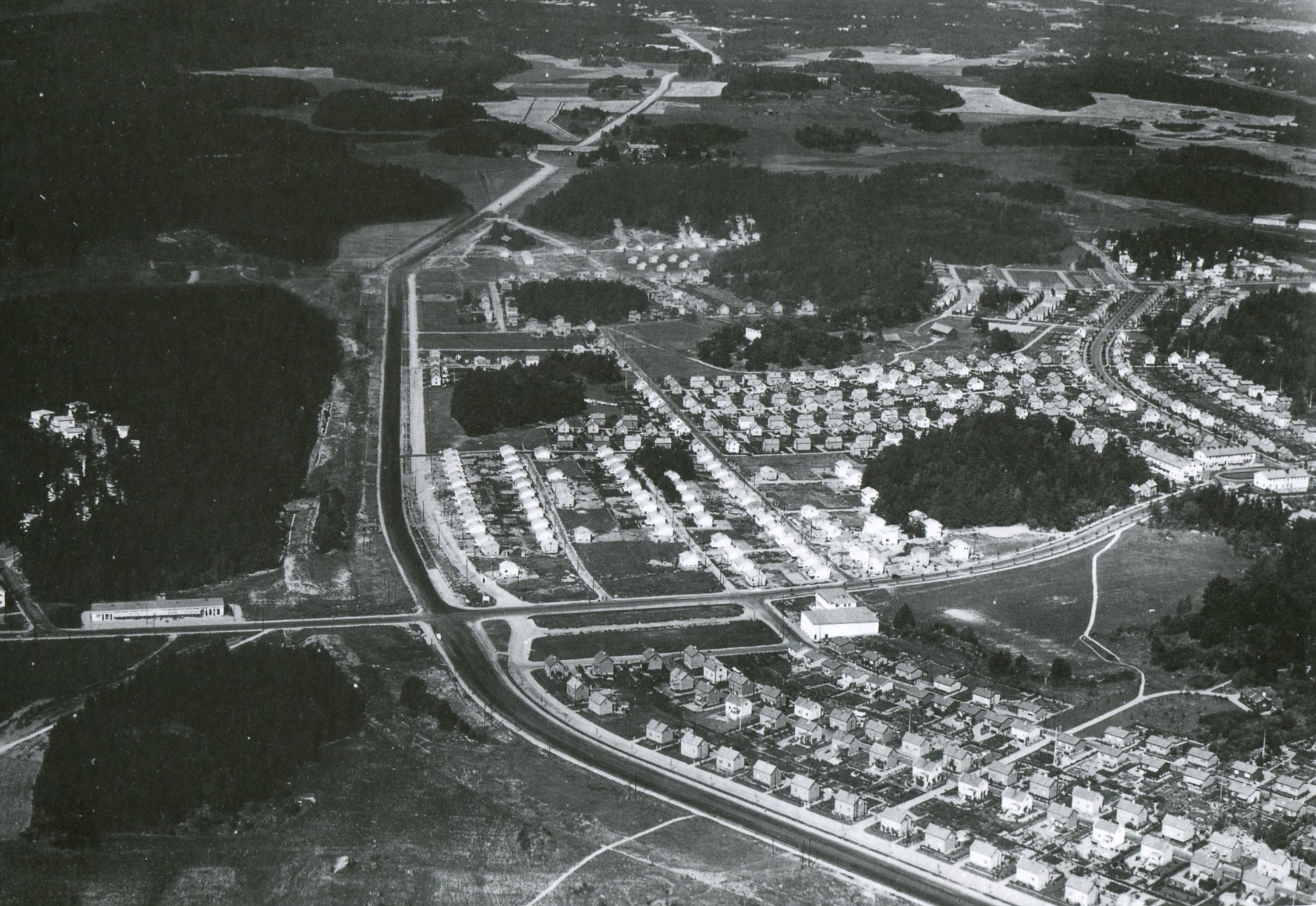 Flygfoto över Norra Ängby, vy mot norr